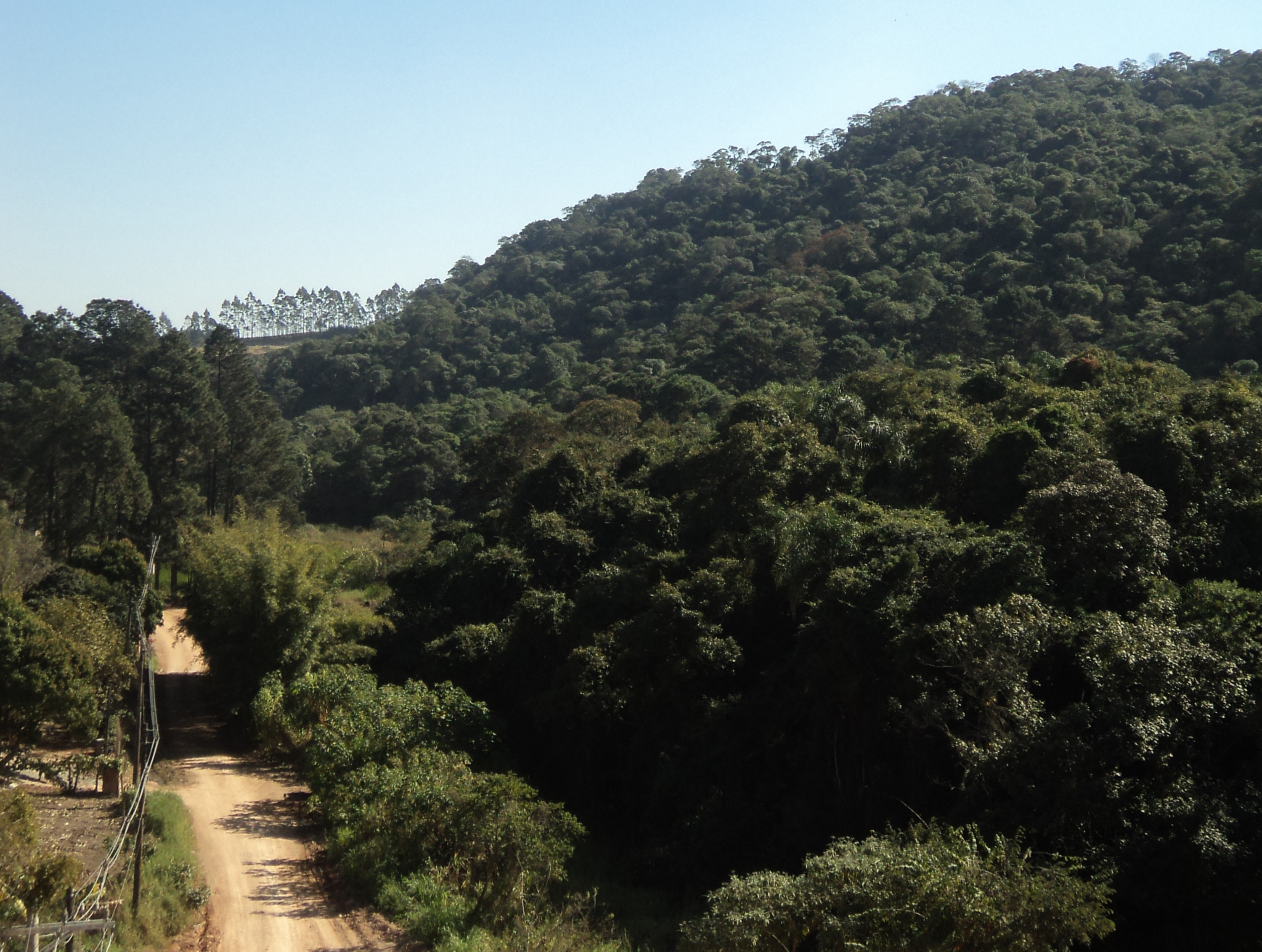 Remanescentes da Mata Atlantica.